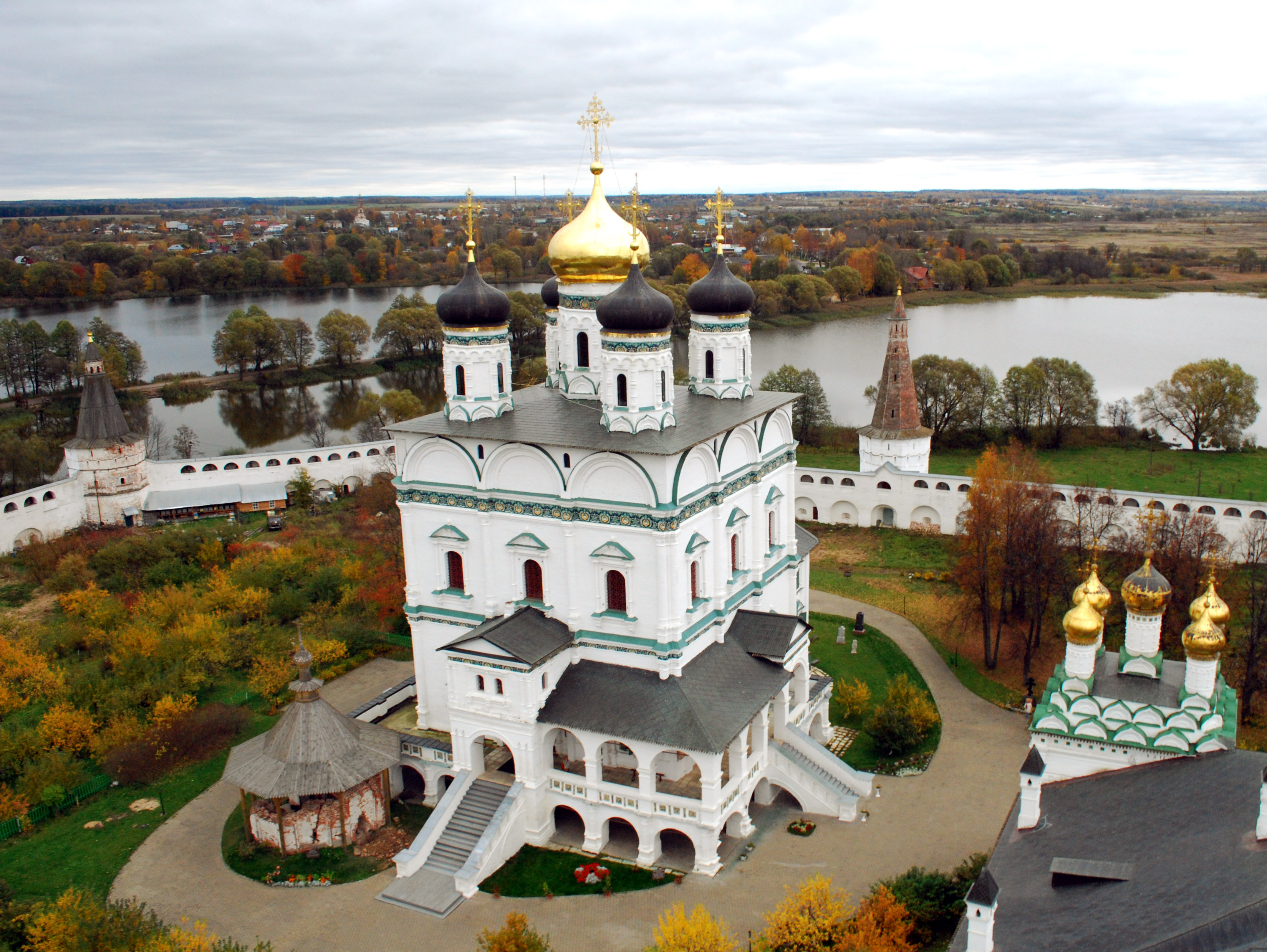 Joseph-Volokolamsk Monastery (Иосифо-Волоцкий монастырь)